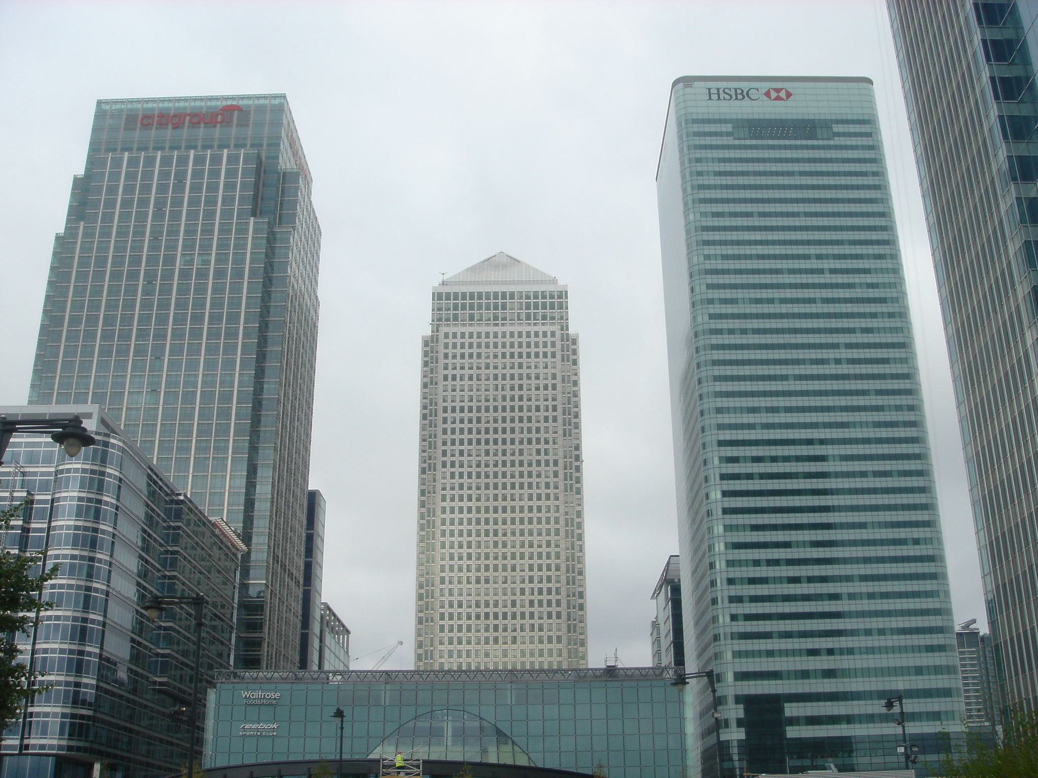 Bear Stearns Zentrale in London